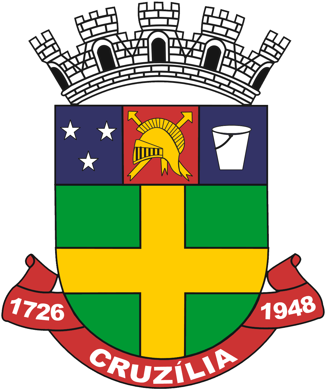 Brasão de Armas de Cruzília/MG Escudo português (ibérico) tendo uma cruz esquartelada em campo de sinople (verde). Um chofo tendo na arte central de goles (vermelho) um capacete romano sobre três setas, tudo em ouro; à destra (direita) em campo de blau (azul), três estrelas de prata postas em roquete; à sinistra (esquerda) um balde de ordenha, de prata, num campo de blau (azul). Um listel de goles (vermelho) carregado com os seguintes dizeres de prata: 1726 - CRUZÍLIA - 1948. Conjunto encimado pela coroa natural de cinco torres de prata, que é a da cidade. Esta descrição heráldica traduz-se pela seguinte interpretação: O escudo português, em toda a sua beleza, lembra a origem lusitana da nossa Pátria; a Cruz a toponímia municipal e também o primitivo nome da cidade, Encruzilhada (encruzilhada de caminhos); o capacete romano ao padroeiro local, São Sebastião, o capitão da guarda do imperador Deocleciano e as flechas que o supliciaram; as três estrelas evidenciam as figuras de Manoel de Sá, Capitão Antônio Pinto Ribeiro e o Capitão Manoel Domingues Maciel, primeiros povoadores; o balde de ordenha, traduz a nossa principal riqueza, o leite. As datas: 1726, ano em que Manoel de Sá recebeu a Sesmaria; 1948, a elevação à categoria de cidade, por força da Lei nº 336, de 27 de dezembro. METAIS E ESMALTES - seus significados: Ouro - força; Prata - candura; Blau (azul) - serenidade; Goles (vermelho) - intrepidez; Sinople (verde) - abundância. As cores municipais são o vermelho e o verde, justapostos. Fonte: Dicionário Escolar DEAC com histórico do município, 1994. Coordenação: Adolfo Maurício Pereira